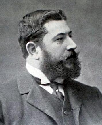 Fotografía de José San Bartolomé Llaneces. 1904